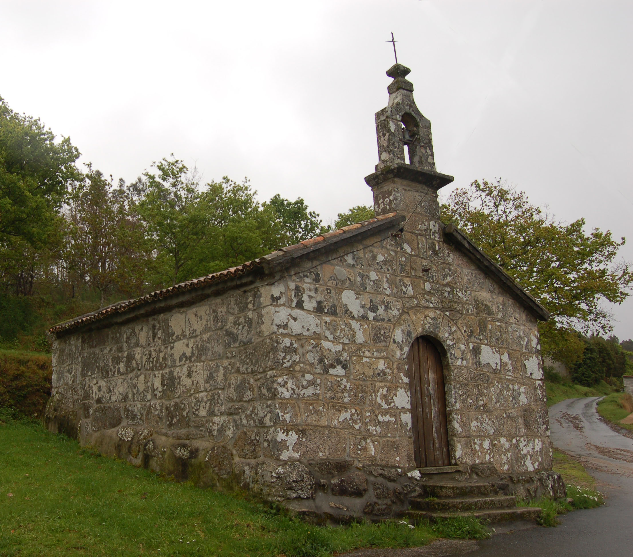 Capela da Virxe do O, no Couso (Campo Lameiro)